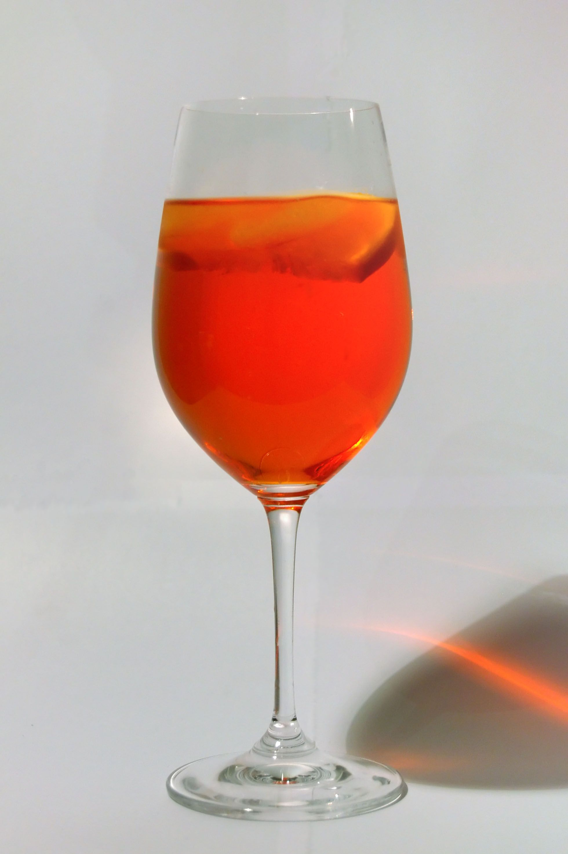 Glas Aperol Spritz